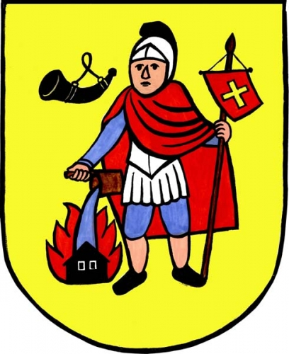 znak, Černíkovice, okres Rychnov nad Kněžnou